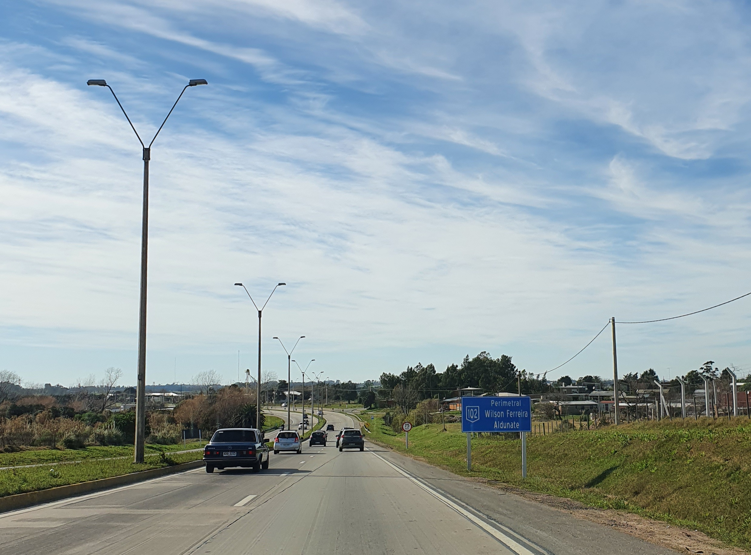 Ruta 102 sentido este, próximo al Camino del Andaluz, Montevideo, Uruguay.